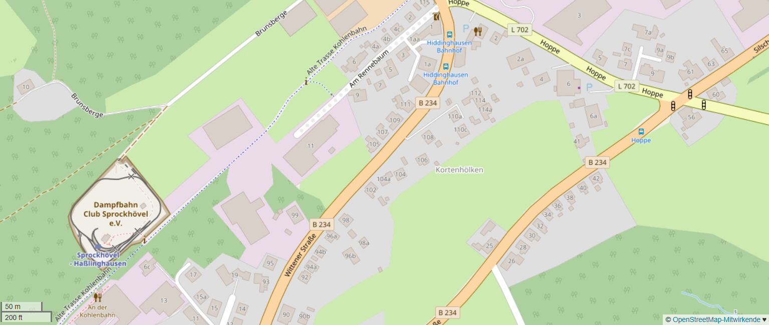 Dampfbahn Club Sprockhövel e.V. (OpenStreetMap)